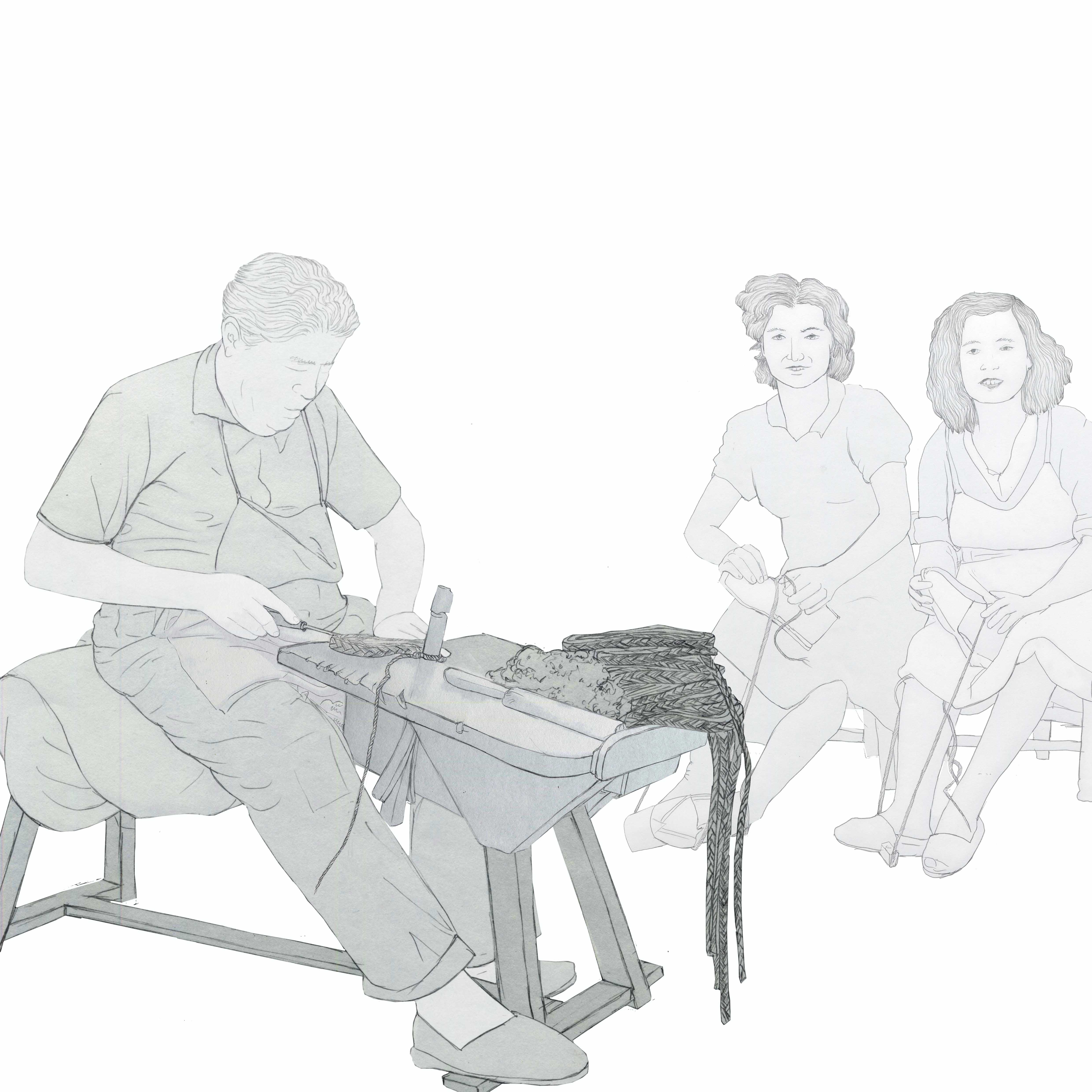 Imatge d'Andrés Marín Jarque (Museu Valencià d'Etnologia) on un espardenyer fa una espardenya.